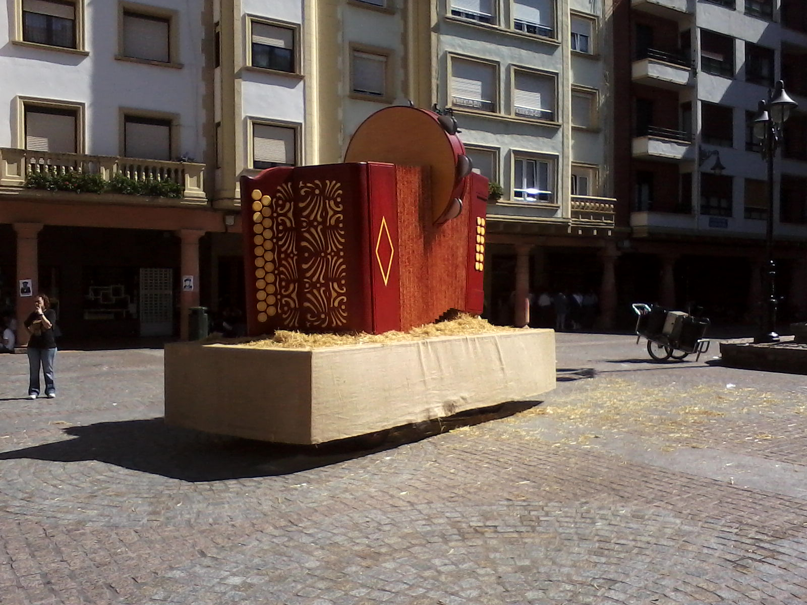 Carroza de la Fiesta Vasca 2011 en donde se representa a la pandereta y al acordeón diatónico (instrumentos típicos del folclore vasco)